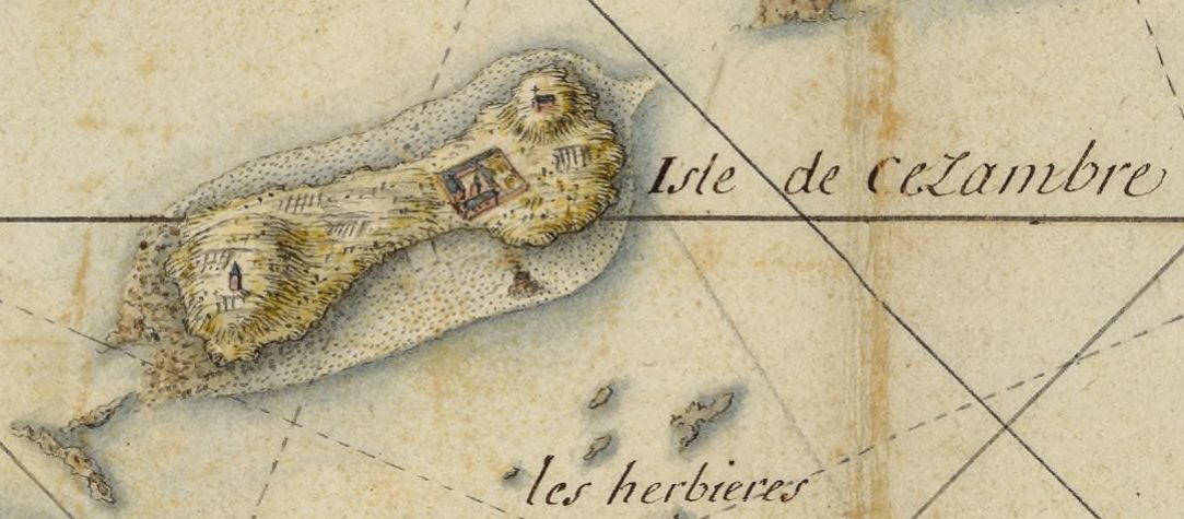 Carte de l'île de Cézembre (au large de Saint Malo) de 1680, montrant le couvent des Récollets et les différentes chapelles sur l'île.